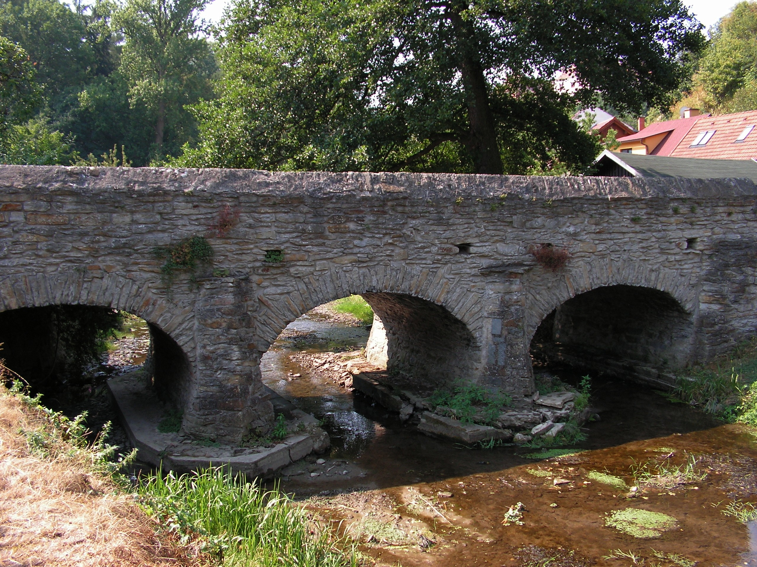 Silniční most přes Zlatý potok v Opočně